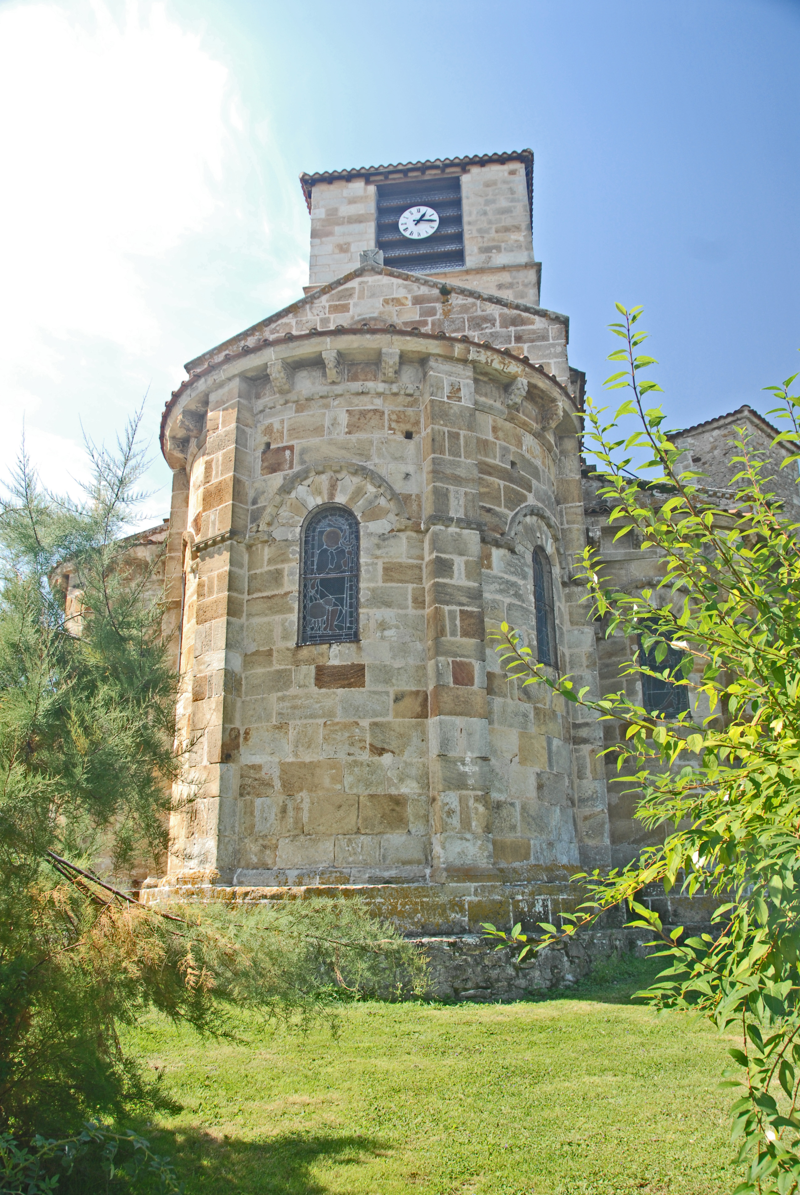 St.-Jean Glaine-Montaigut, Chorhaupt von O